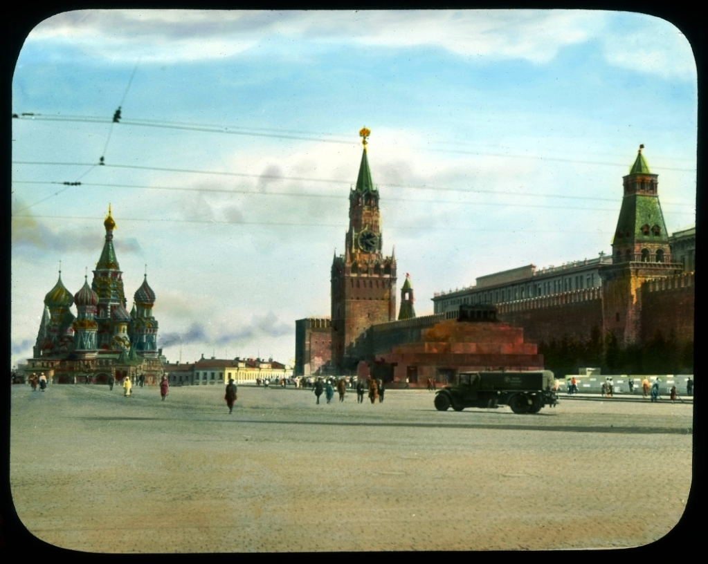 Москва. Красная площадь